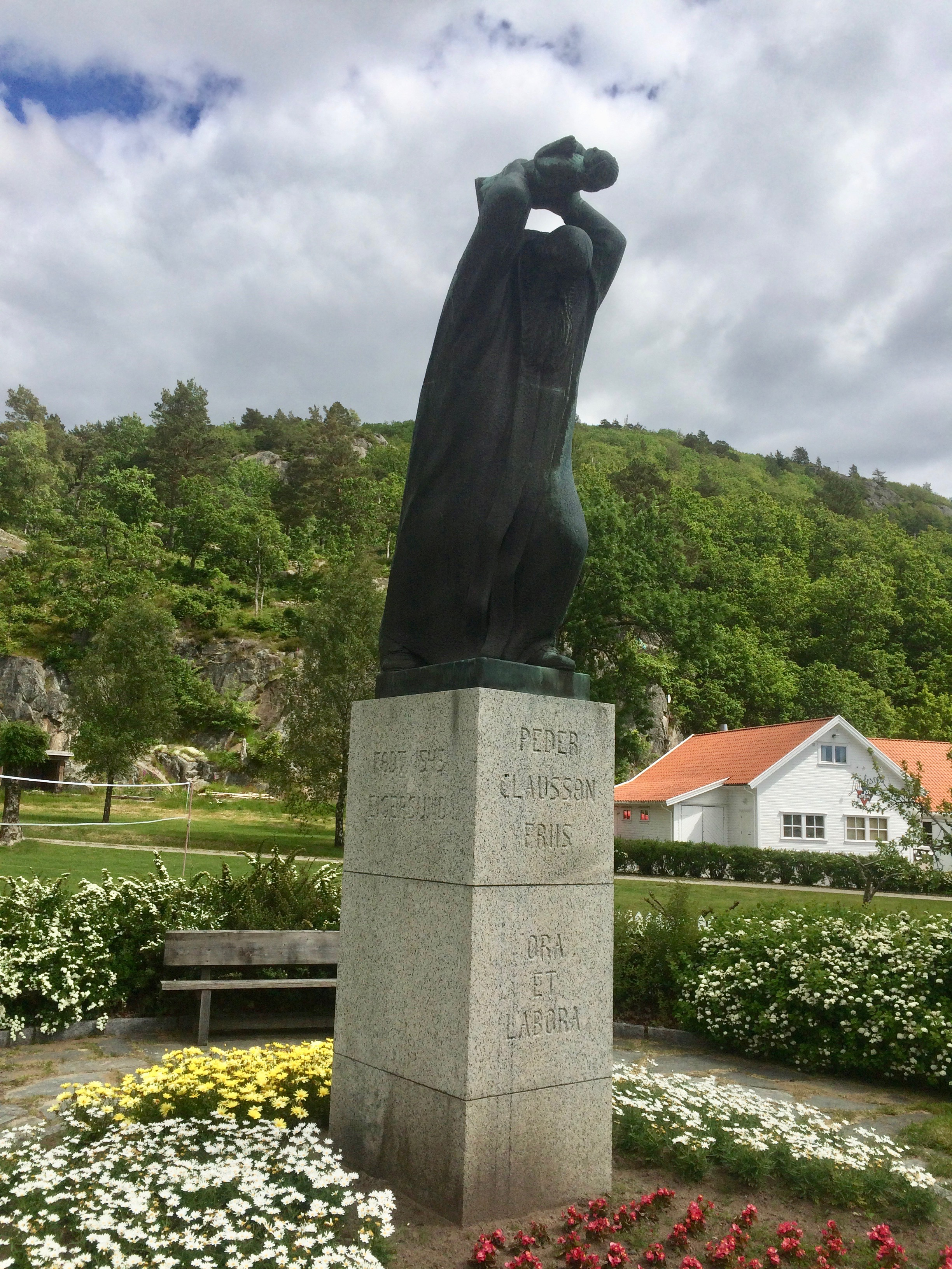 Monument over Peder Claussøn Friis. 1938. Skulptør: Gustav Vigeland ved Valle kirke